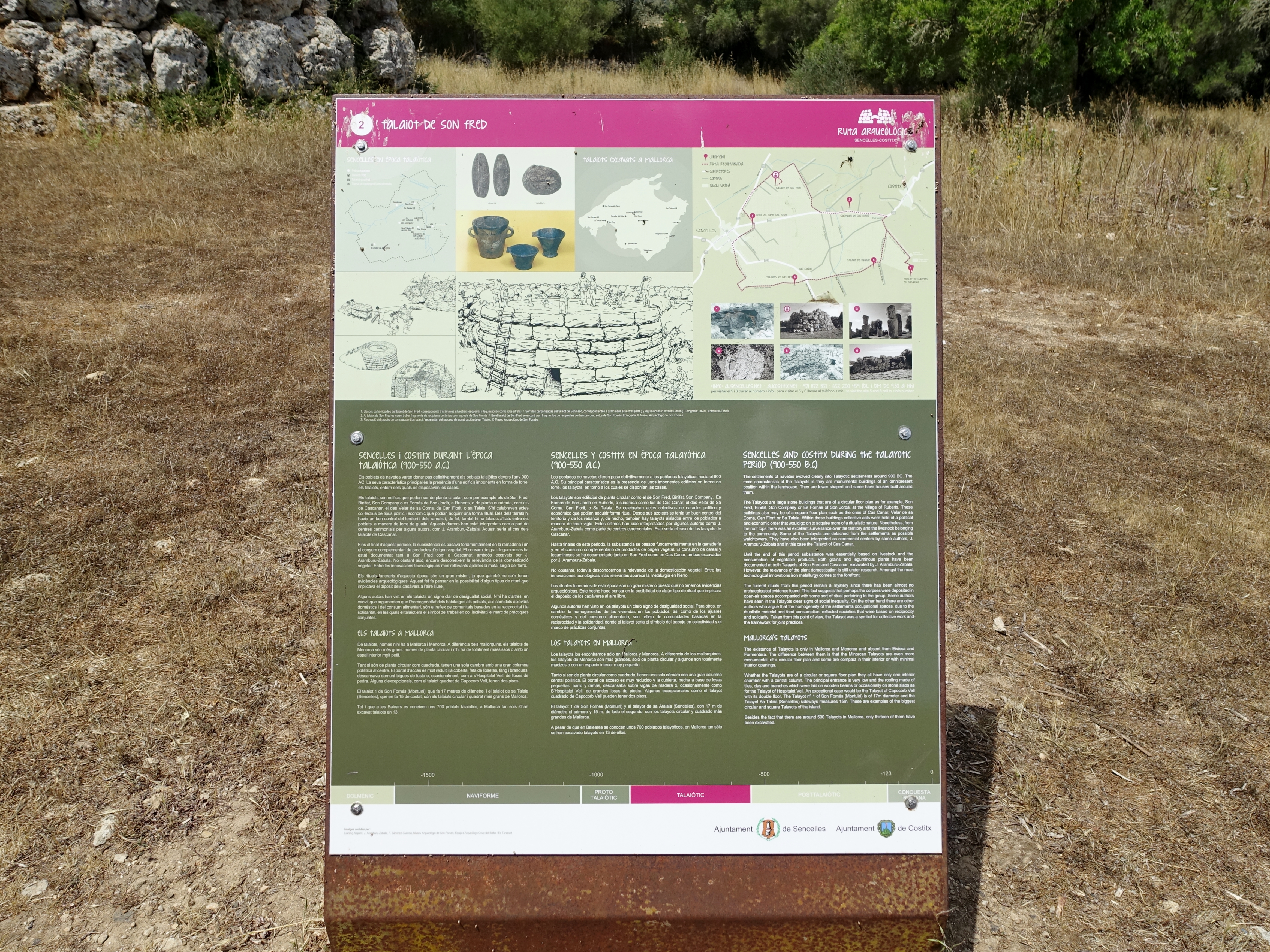 Hinweisschild am Talaiot de Son Fred, Gemeinde Sencelles, Mallorca, Spanien